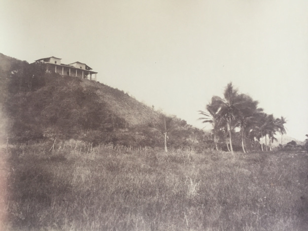 Fotografía del húngaro Pál Rosty, tomada en 1857.